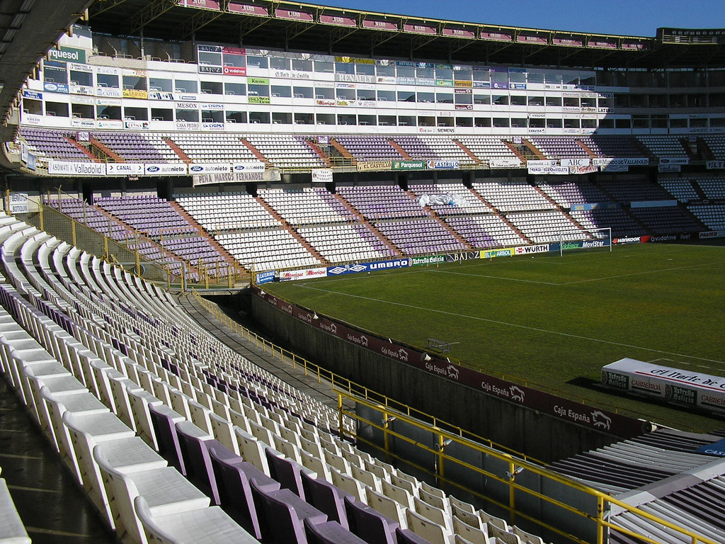 Vista del Fondo Norte del Estadio José Zorrilla de Valladolid desde Preferencia A.